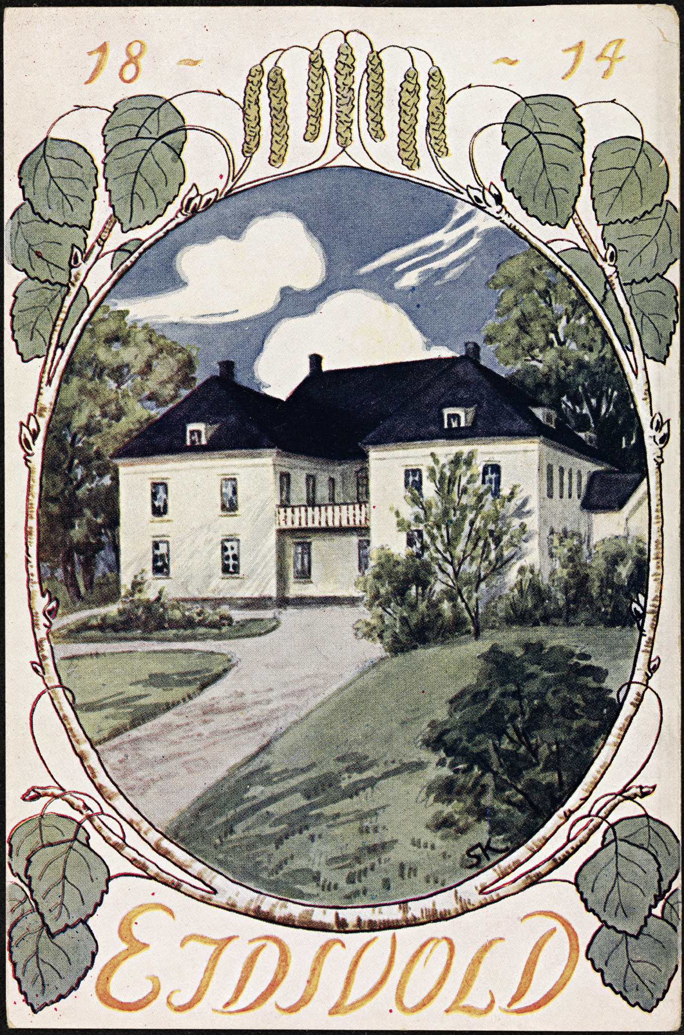 Tittel / Title: Eidsvold 1814 Beskrivelse / Description: Postkort. Kunstner / Artist: Sverrer Knudsen (1875-1923) Utgiver / Publisher: C. A. Erichsen (Christiania) Utgitt / Published: 1914 Sted / Place: Akershus, Eidsvoll Eier / Owner Institution: Nasjonalbiblioteket / National Library of Norway Lenke / Link: Bildesignatur / Image Number: blds_05731